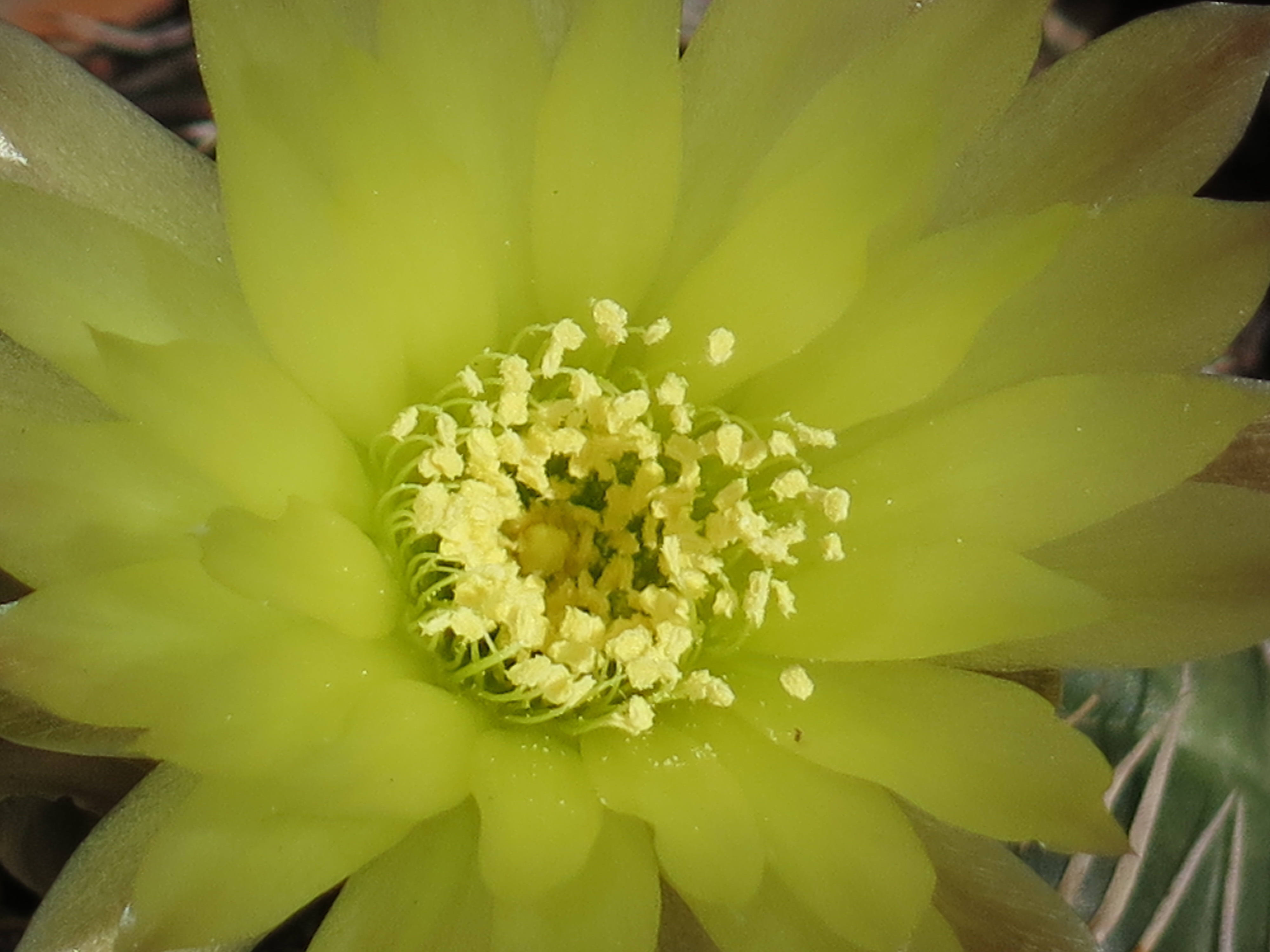 Il fiore del gymnocalycium leeanum